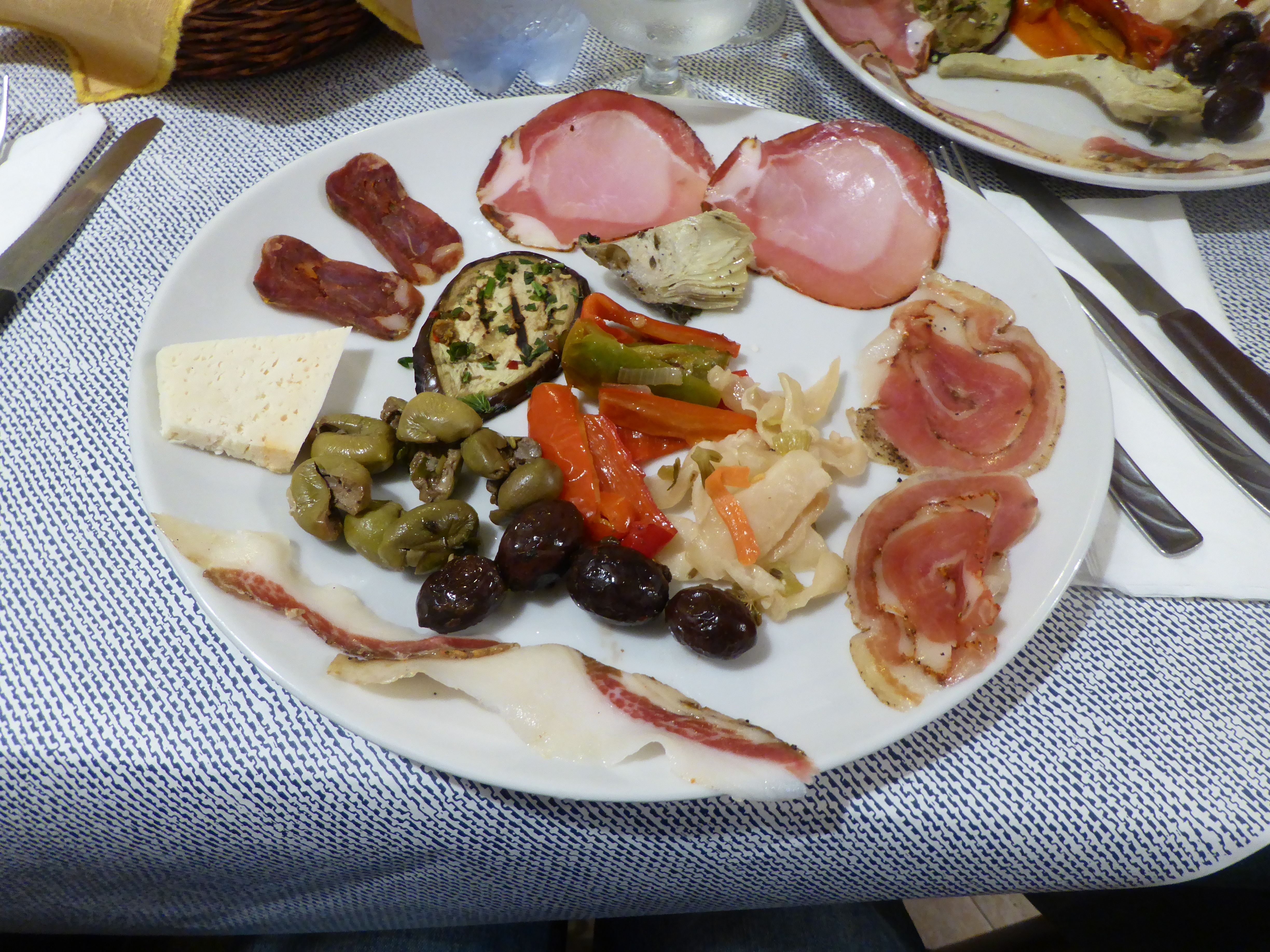 Antipasto calabrese 2018